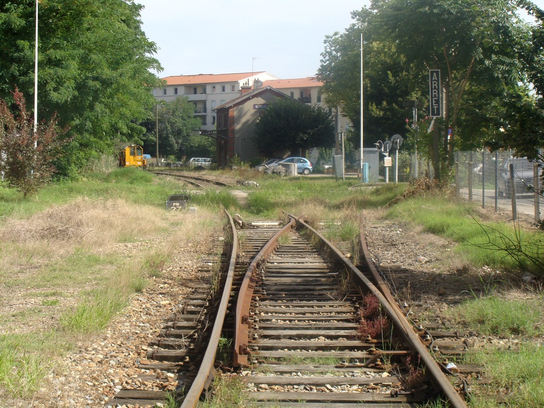 L'aiguille d'entrée en gare de Neuville-sur-Saône côté nord. Noter la commande d'arrêt devant le passage à niveau.